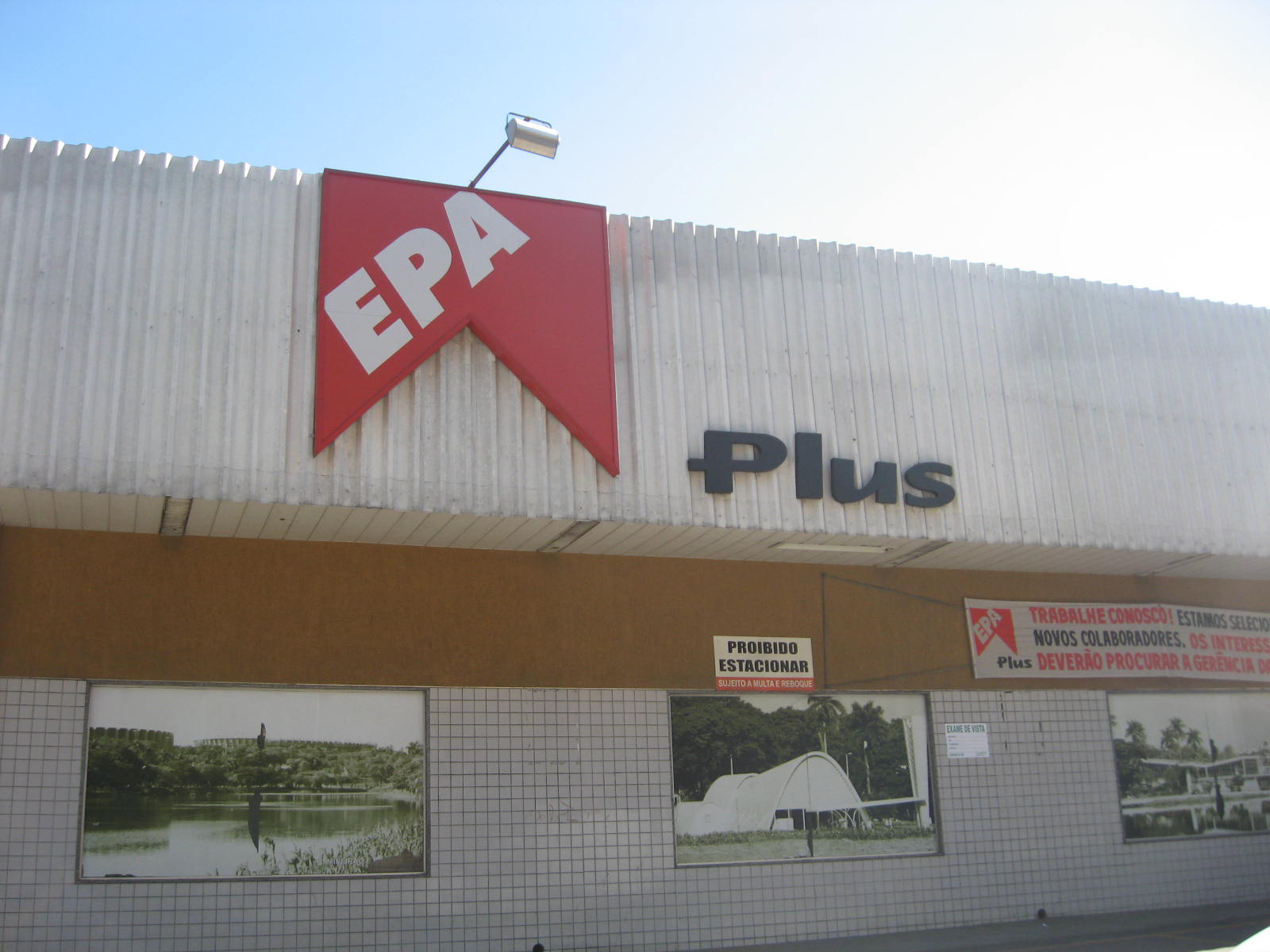 Vista do Epa Plus, na região da Pampulha, em Belo Horizonte, Minas Gerais, Brasil.